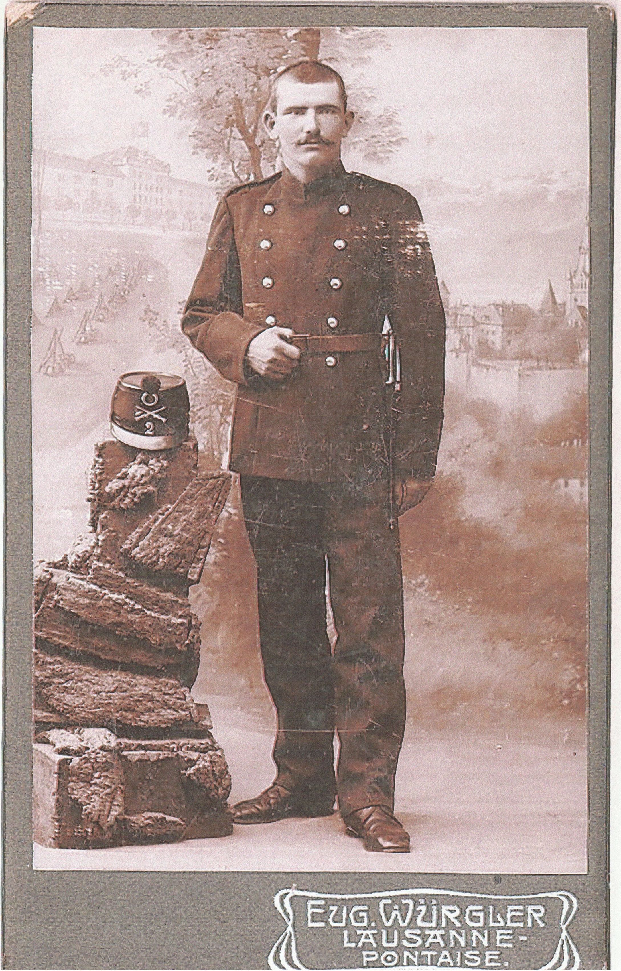 John Baudraz (1890-1968), instituteur vaudois, premier soldat jugé en Suisse pour refus de servir pour motifs religieux durant la Première Guerre mondiale.